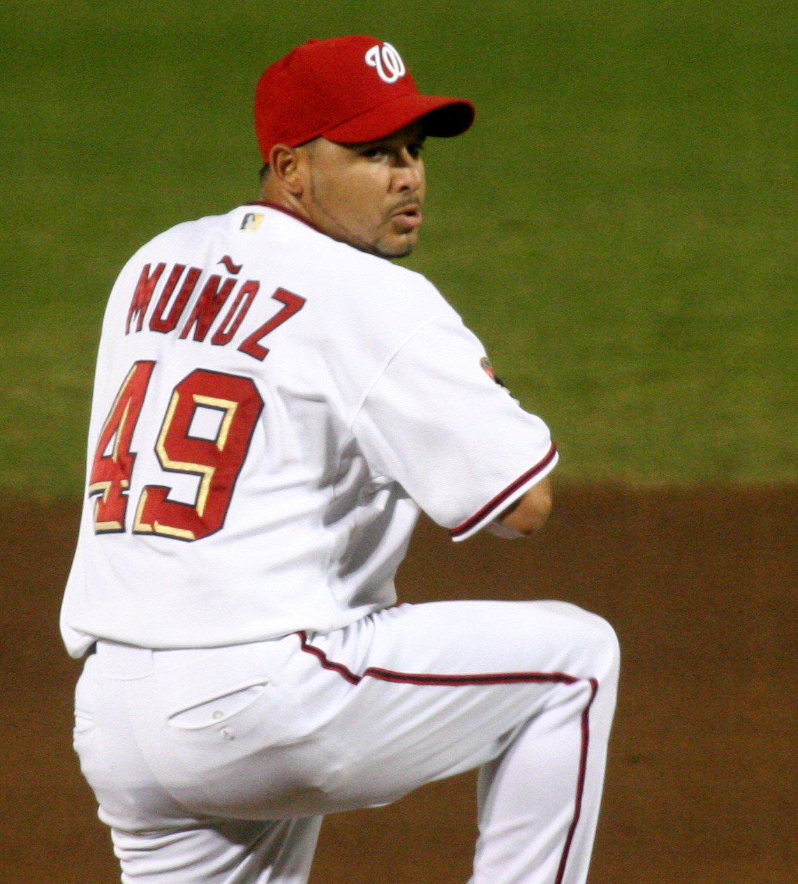 Arnie Muñoz